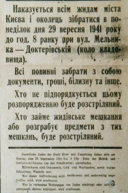 notice